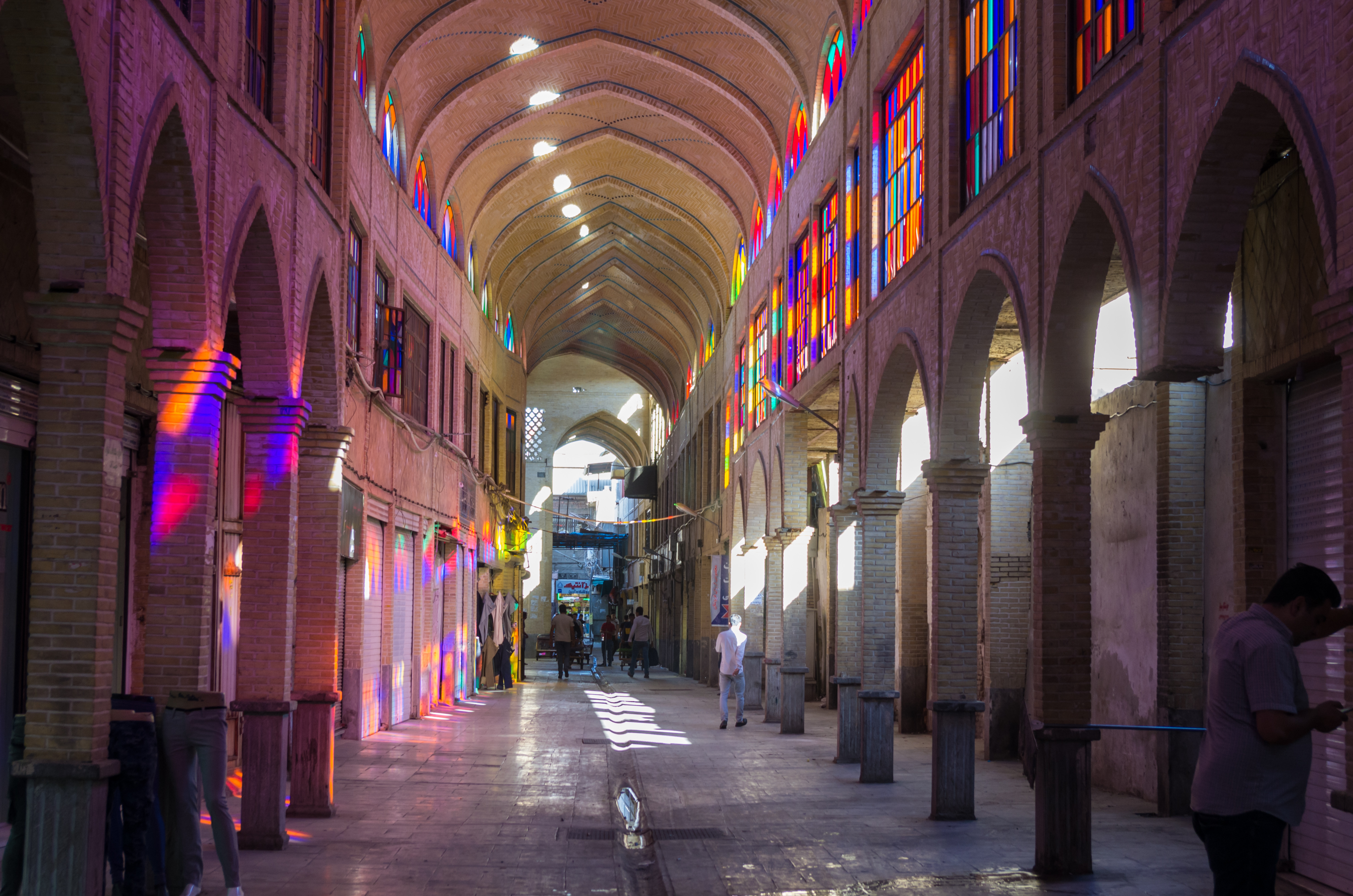 Grand Bazaar de Tehran